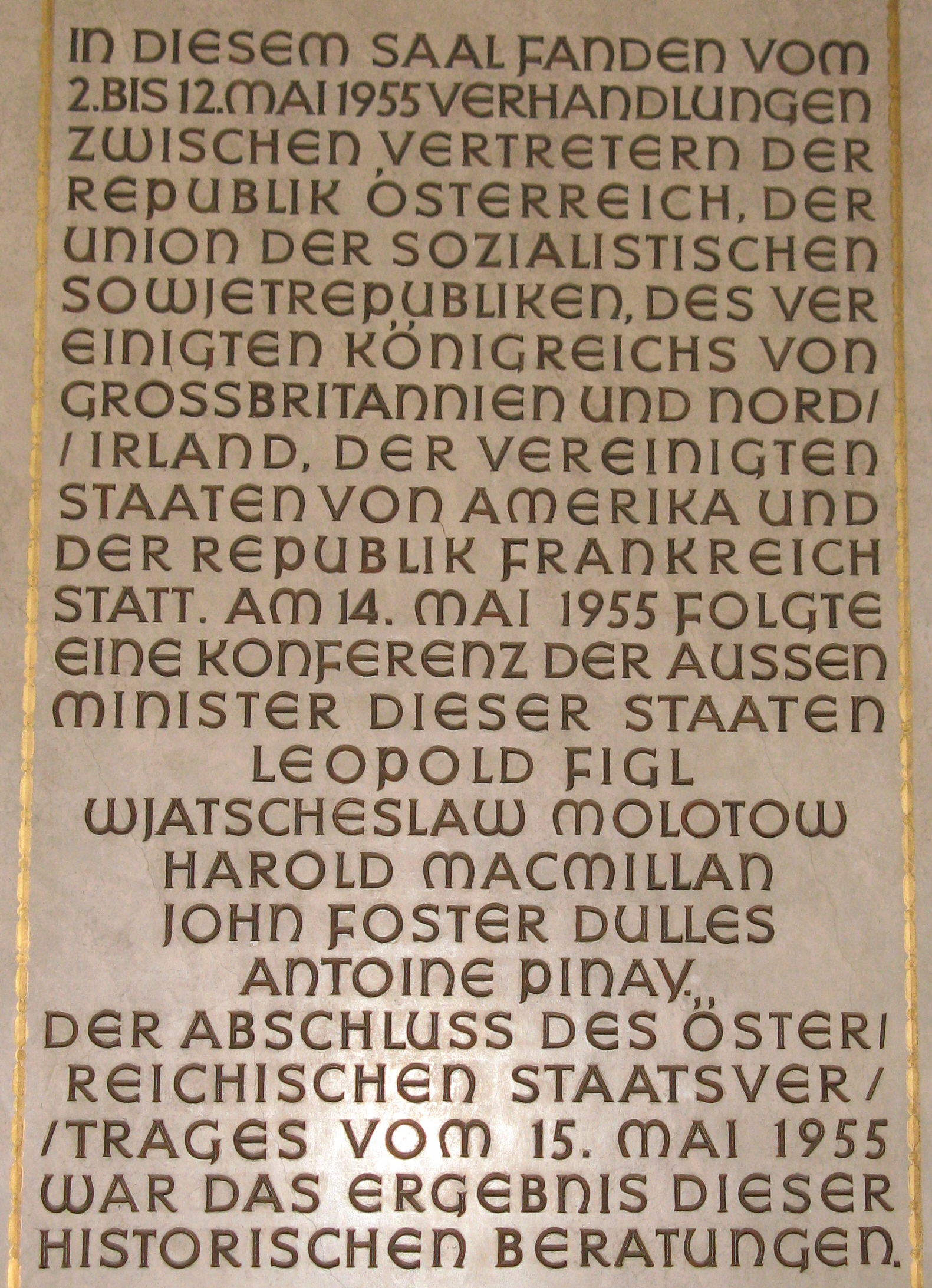 Gedenkinschrift über die Staatsvertragsverhandlungen 1955 im Haus der Industrie, Kleiner Festsaal, in Wien-Landstraße